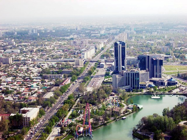 Vue d'Aqua-Park et de la Tour NBU depuis la tour TV